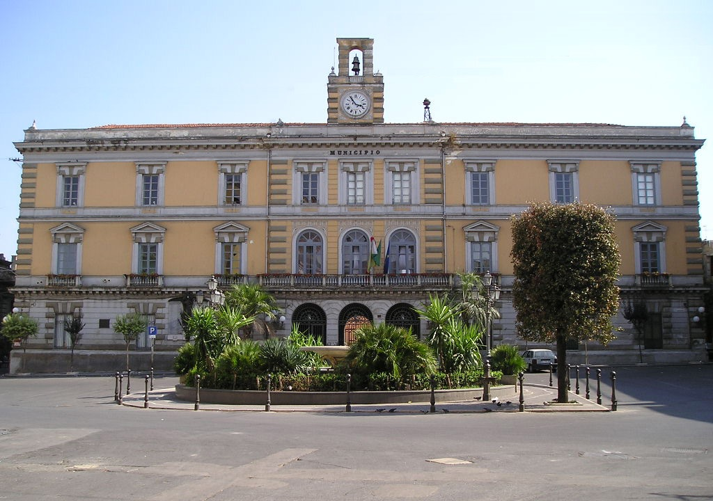 Municipio_Afragola